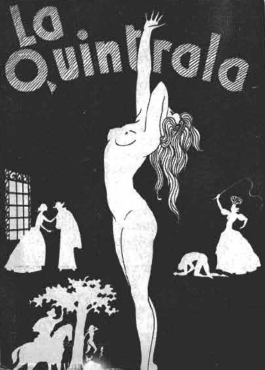 Nota en la revista Ecran de 1932, donde se informa la pronta publicación de la novela "La Quintrala" de Magdalena Petit.